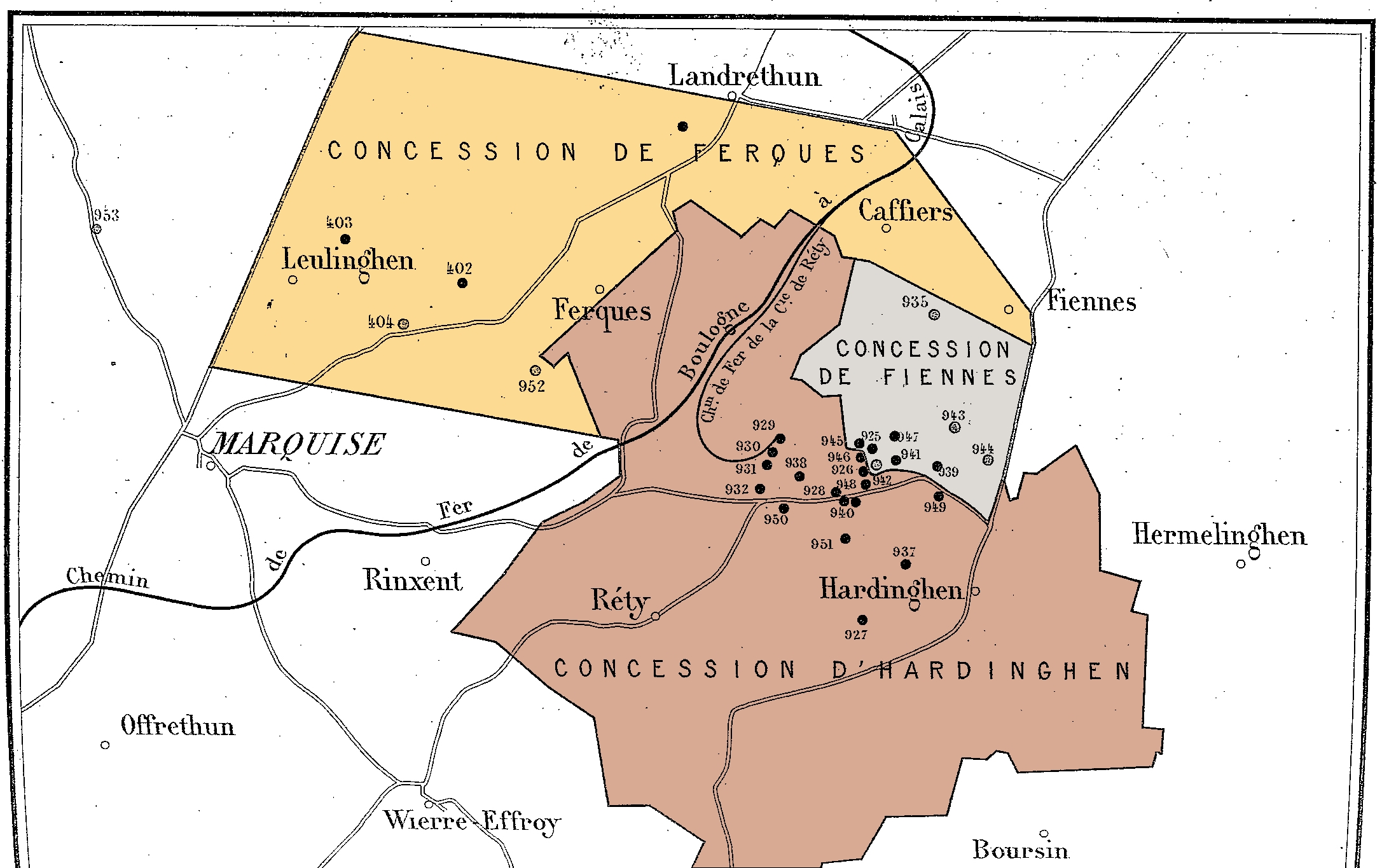 Carte des concessions du Bassin minier du Boulonnais faite à partir de la carte de l'état des travaux de la Société de Ferques vers 1880.